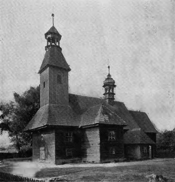 Die 1945 abgebrannte Schrotholzkirche in Ellguth-Turawa in Oberschlesien um 1929.